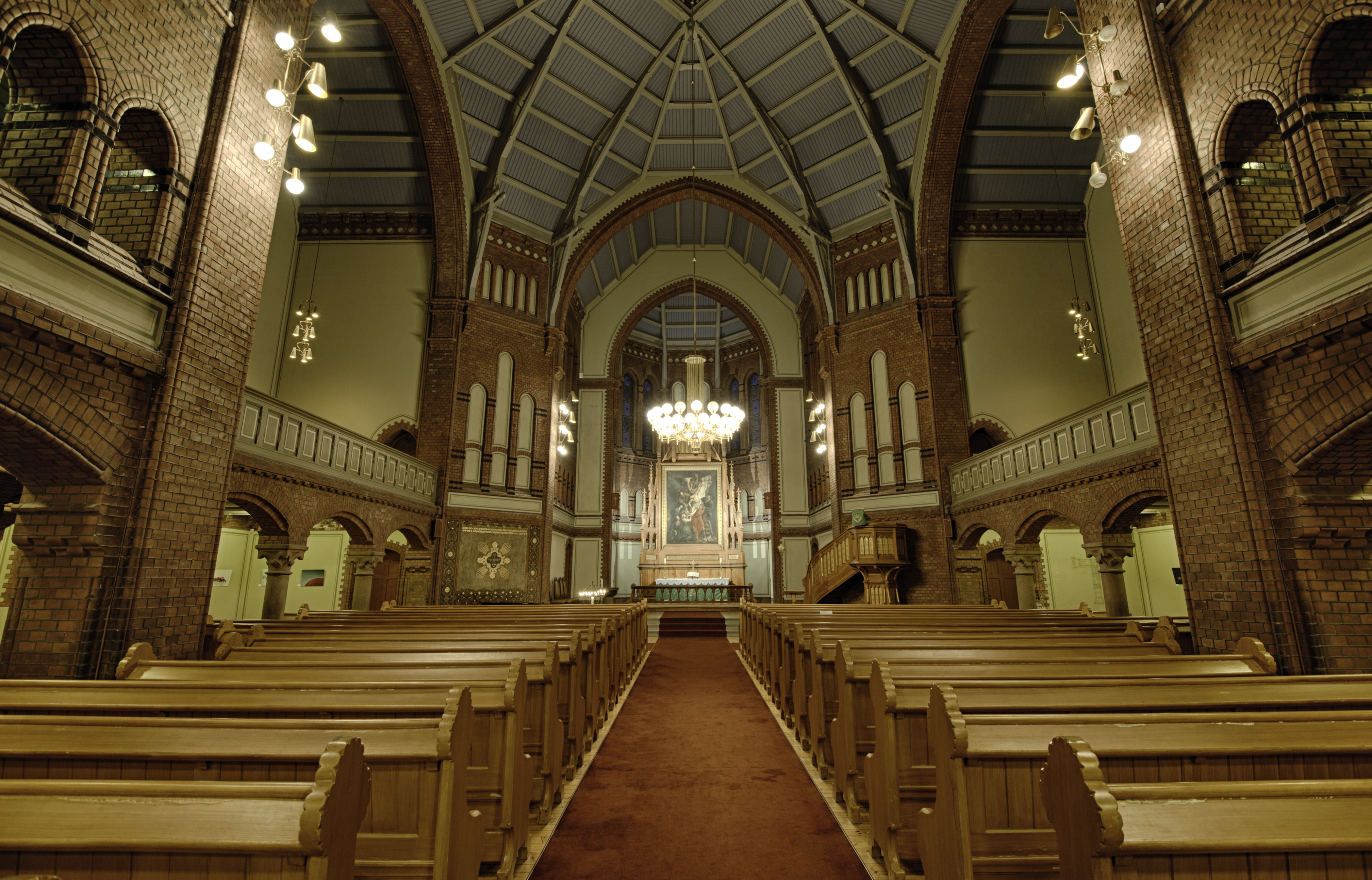 Hovedskipet, sett fra inngangen.